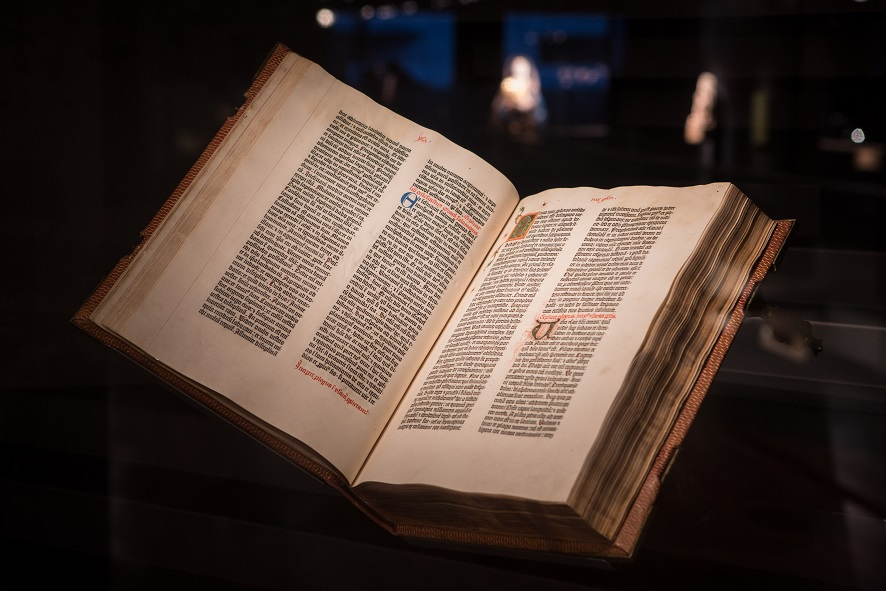 Bible "à 42 lignes" de Gutenberg, en deux volumes, 1454, Mayence. Conservé et exposée à la Fondation Martin Bodmer.